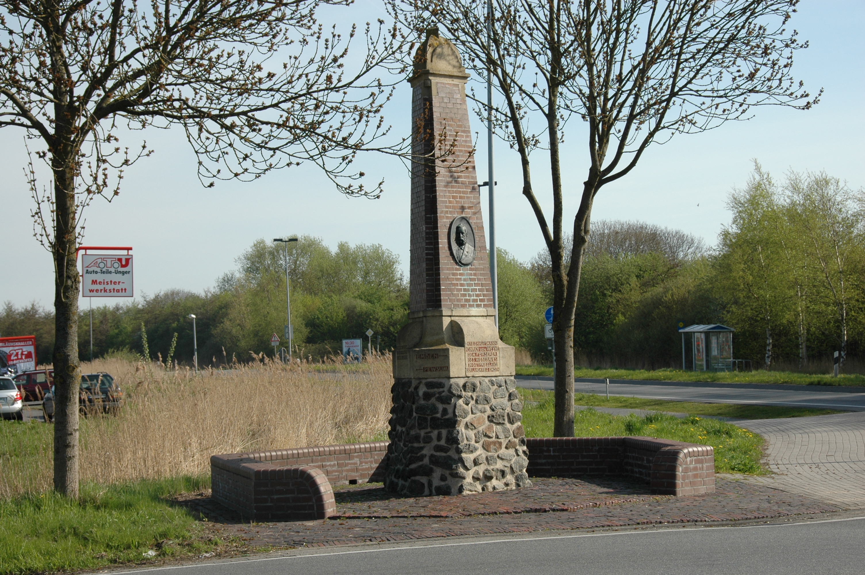 Heinrich von Weyhe, geb. 1820, gest. 1887, Kreishauptmann, Förderer des Wegebaues in Ostfriesland